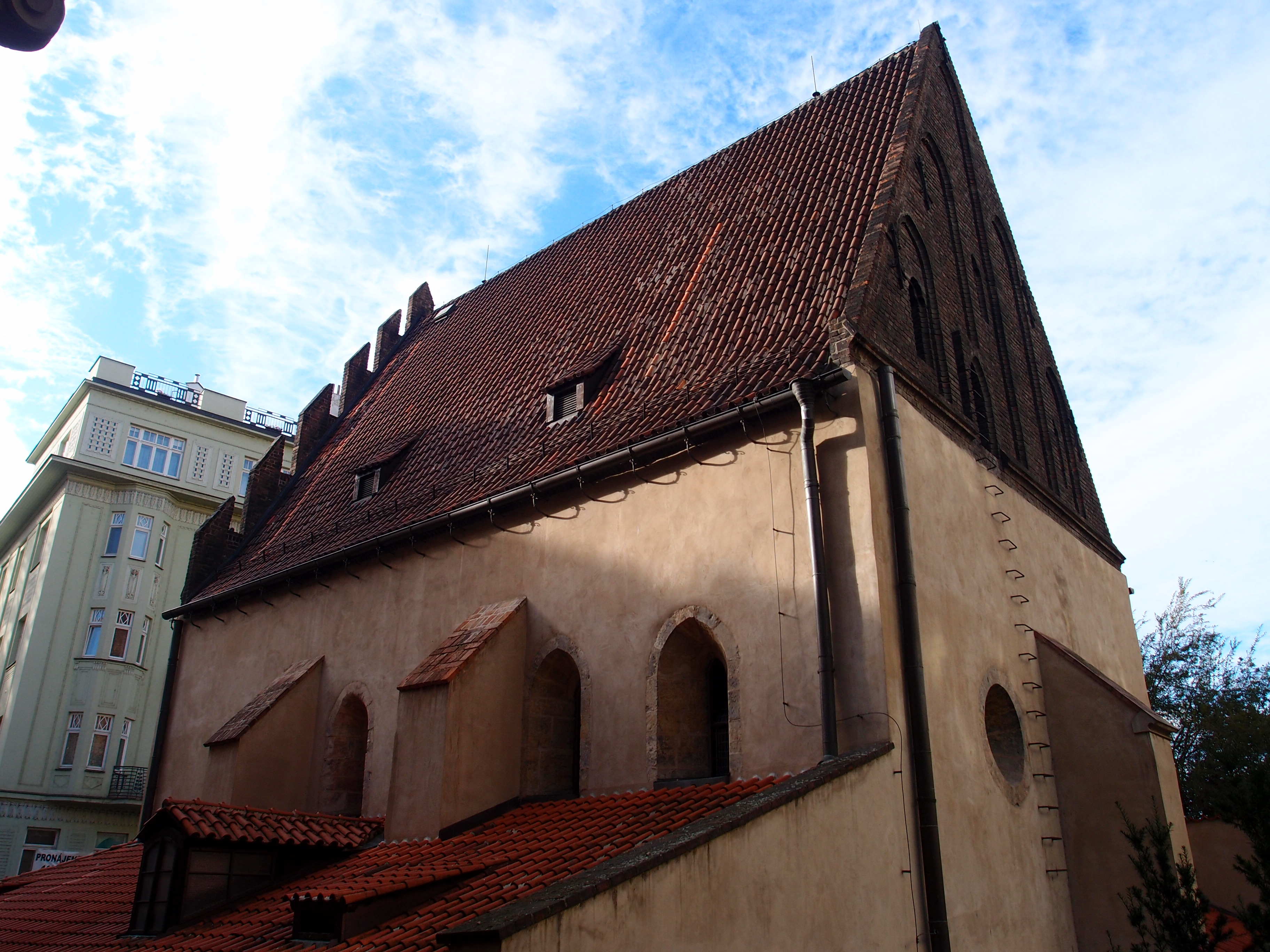 Staronová synagoga (Josefov), Červená, Maiselova, Josefov, Praha 1